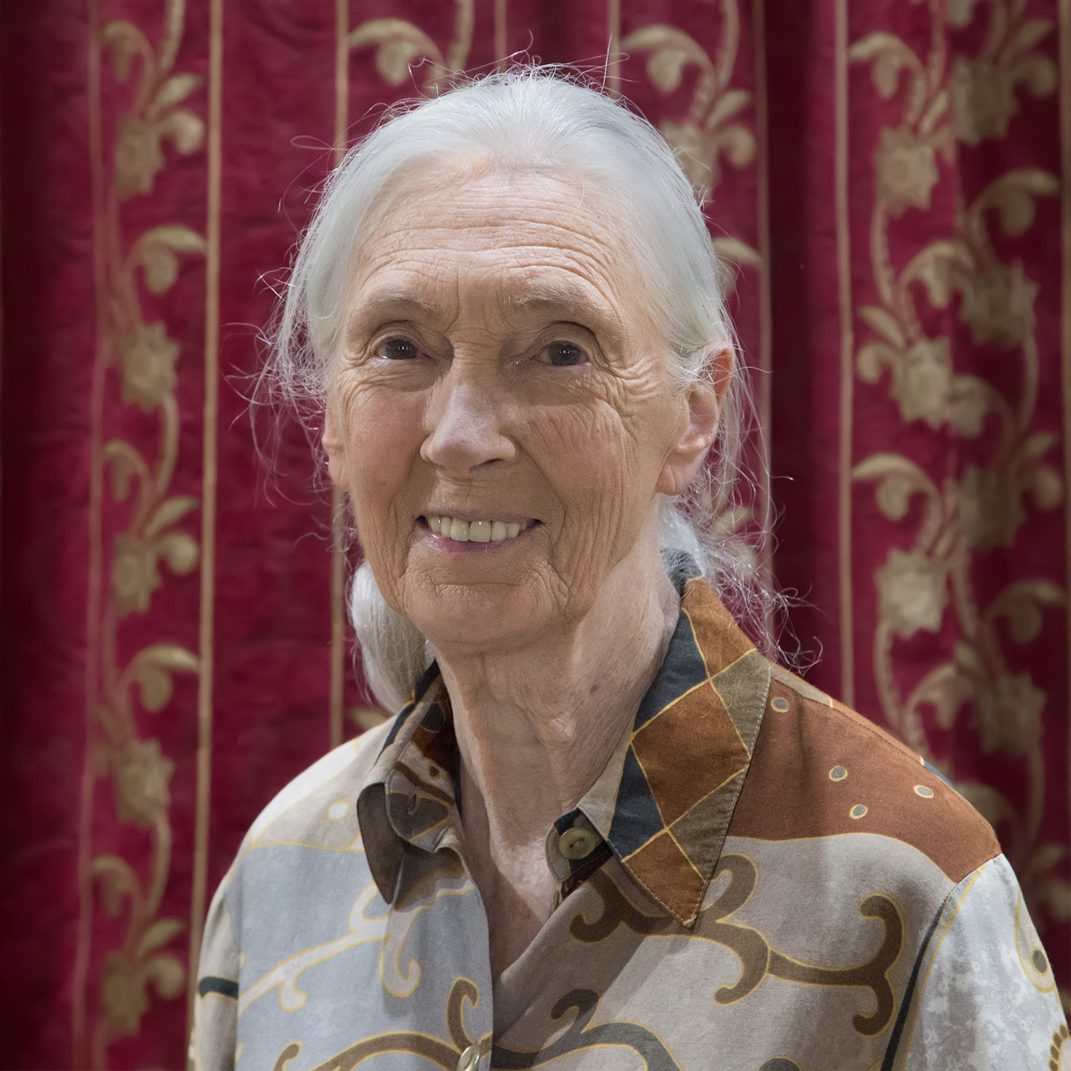 Dame Jane Goodall in Tanzania